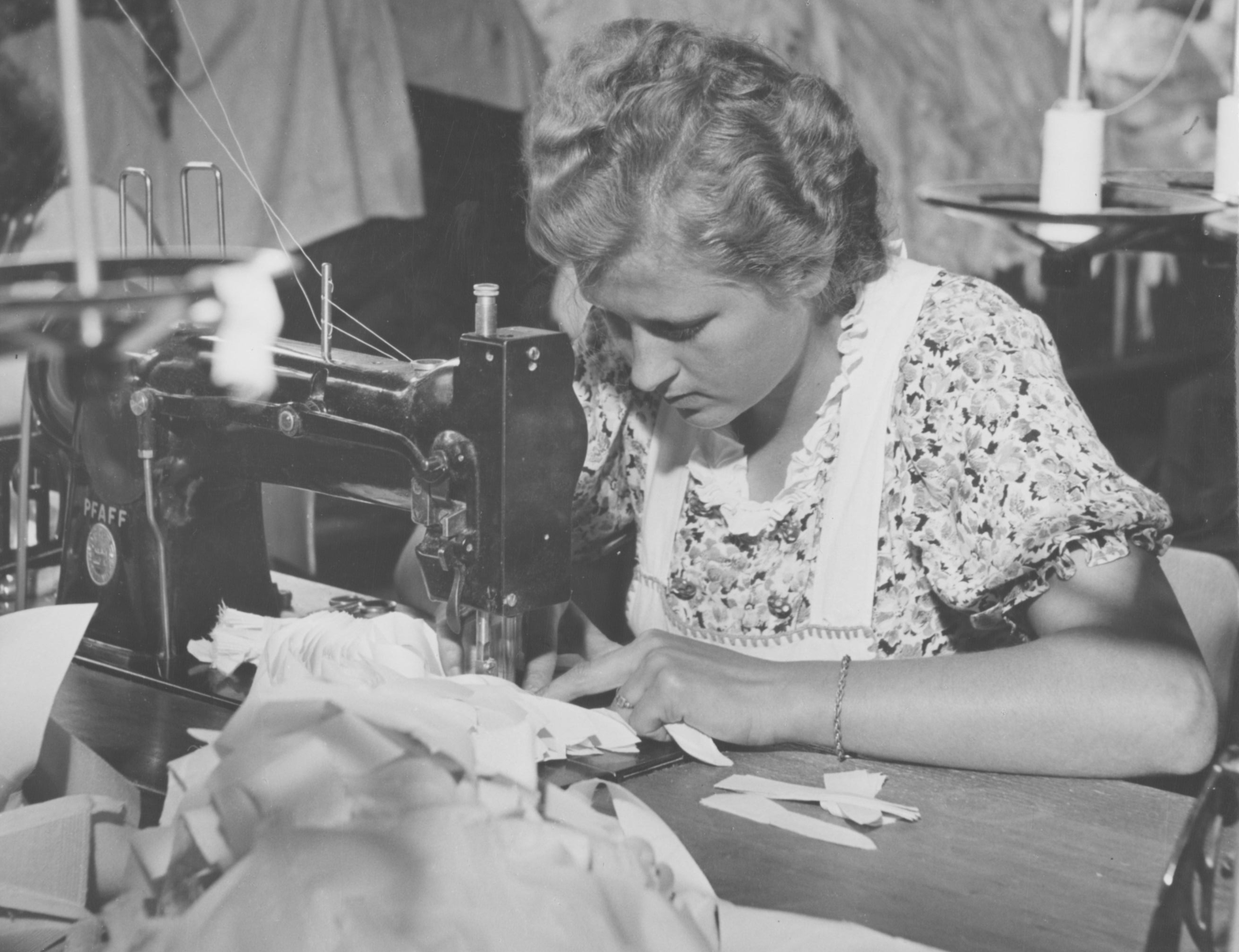 Näherei von Triumph International